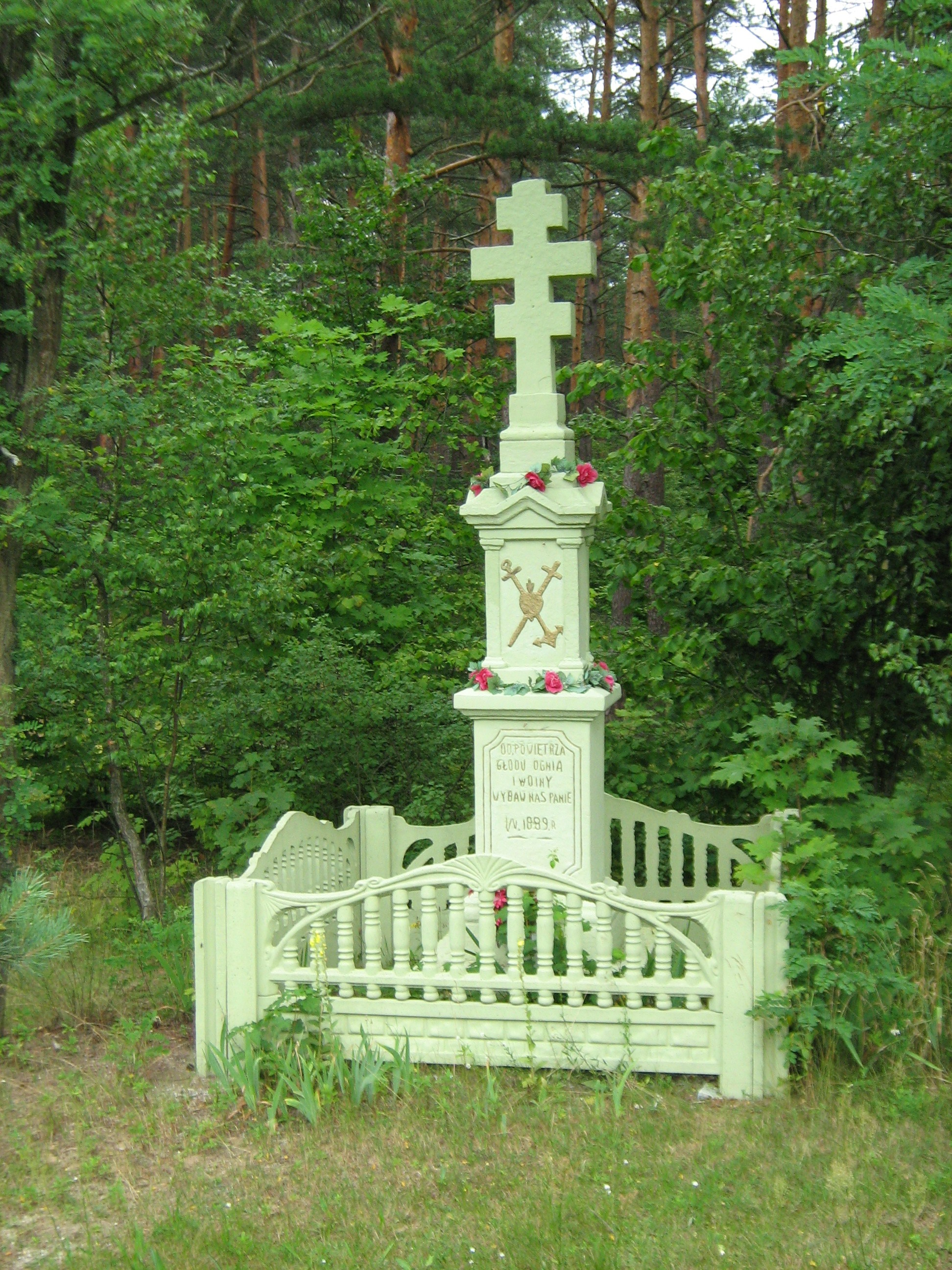 Szopowe (pow. Biłgoraj).